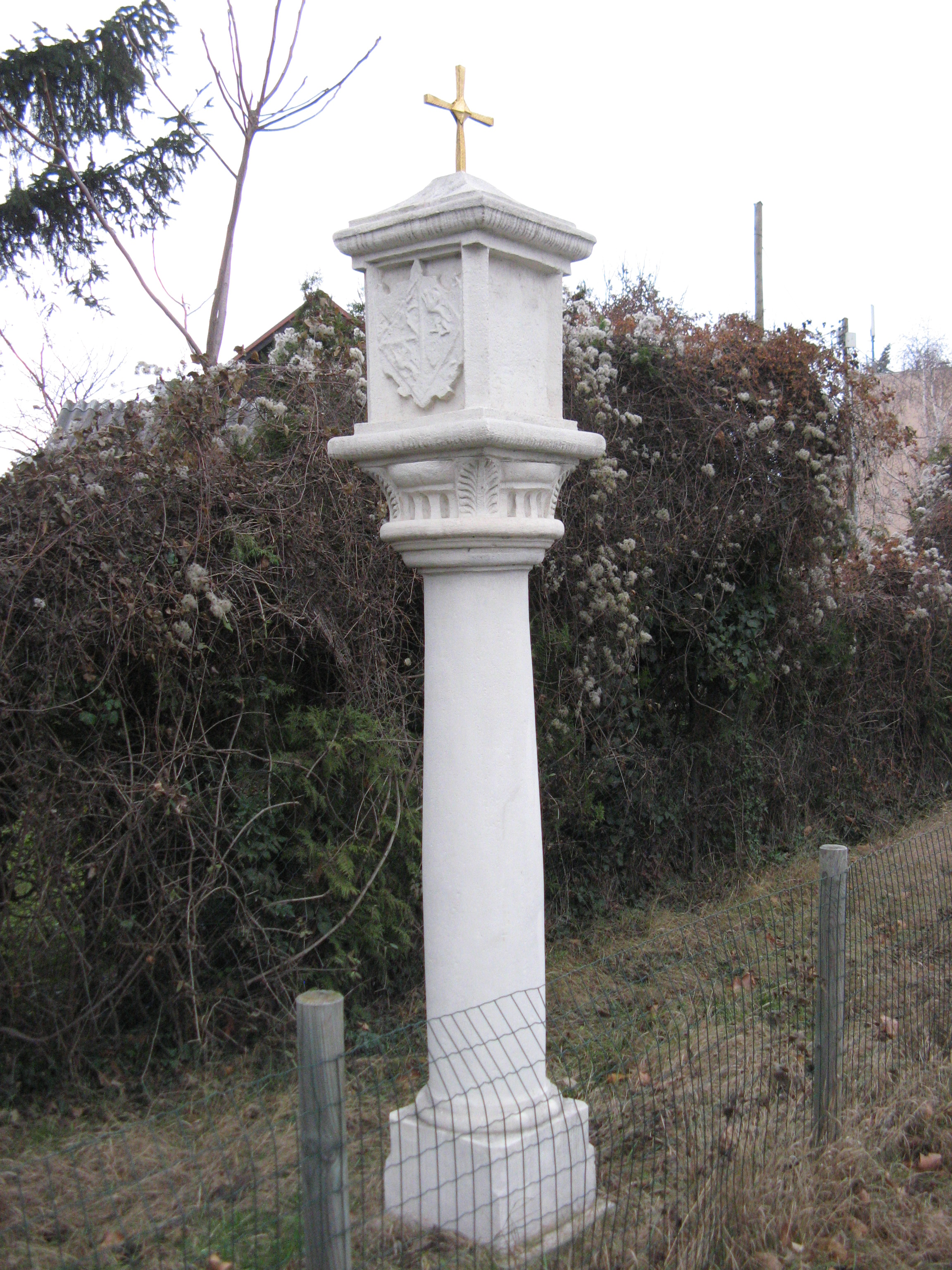 Bildstock "Magere Henn", Laaer-Berg-Straße bei Nr. 100, Wien-Favoriten